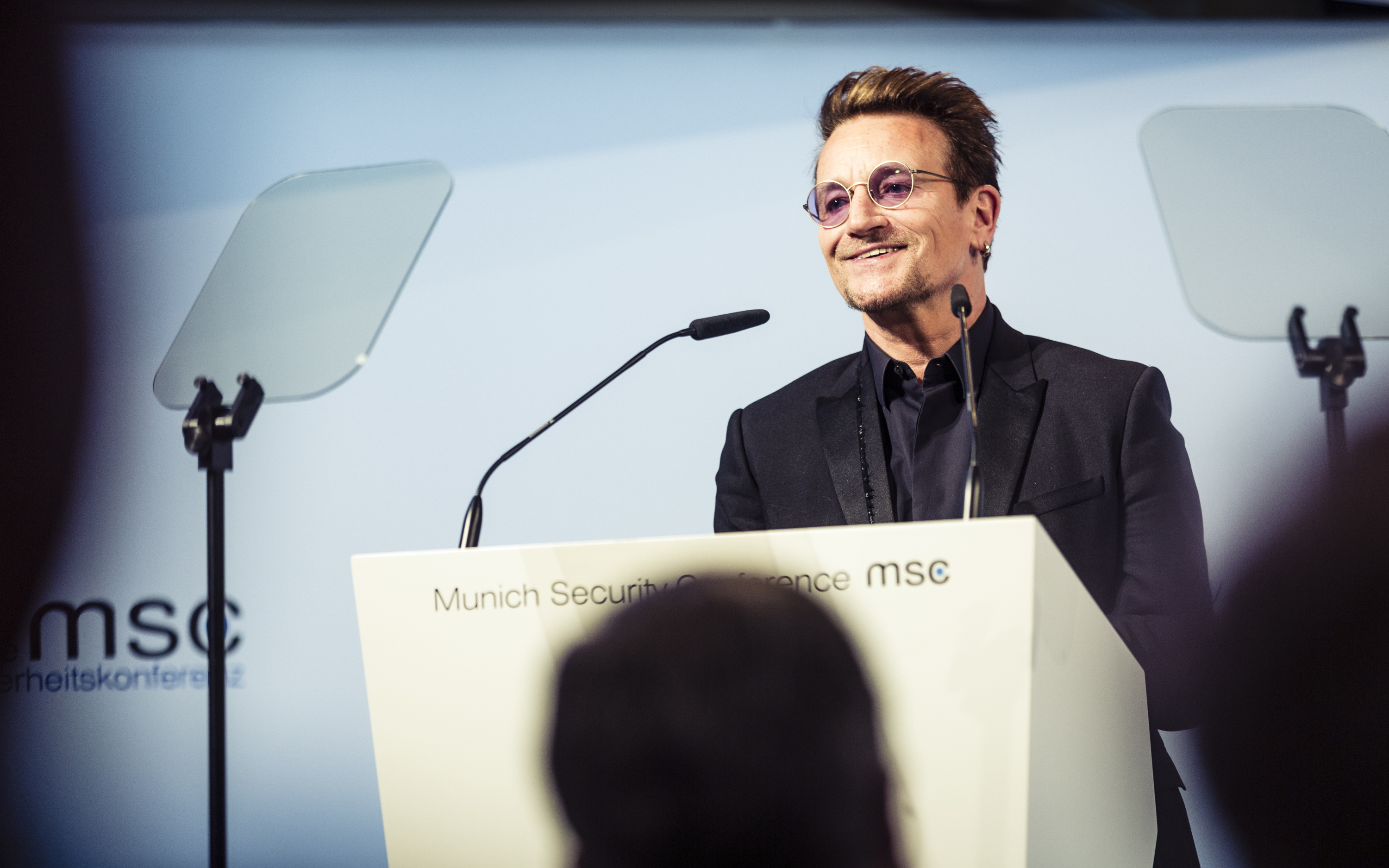 Bono während der Münchner Sicherheitskonferenz 2017